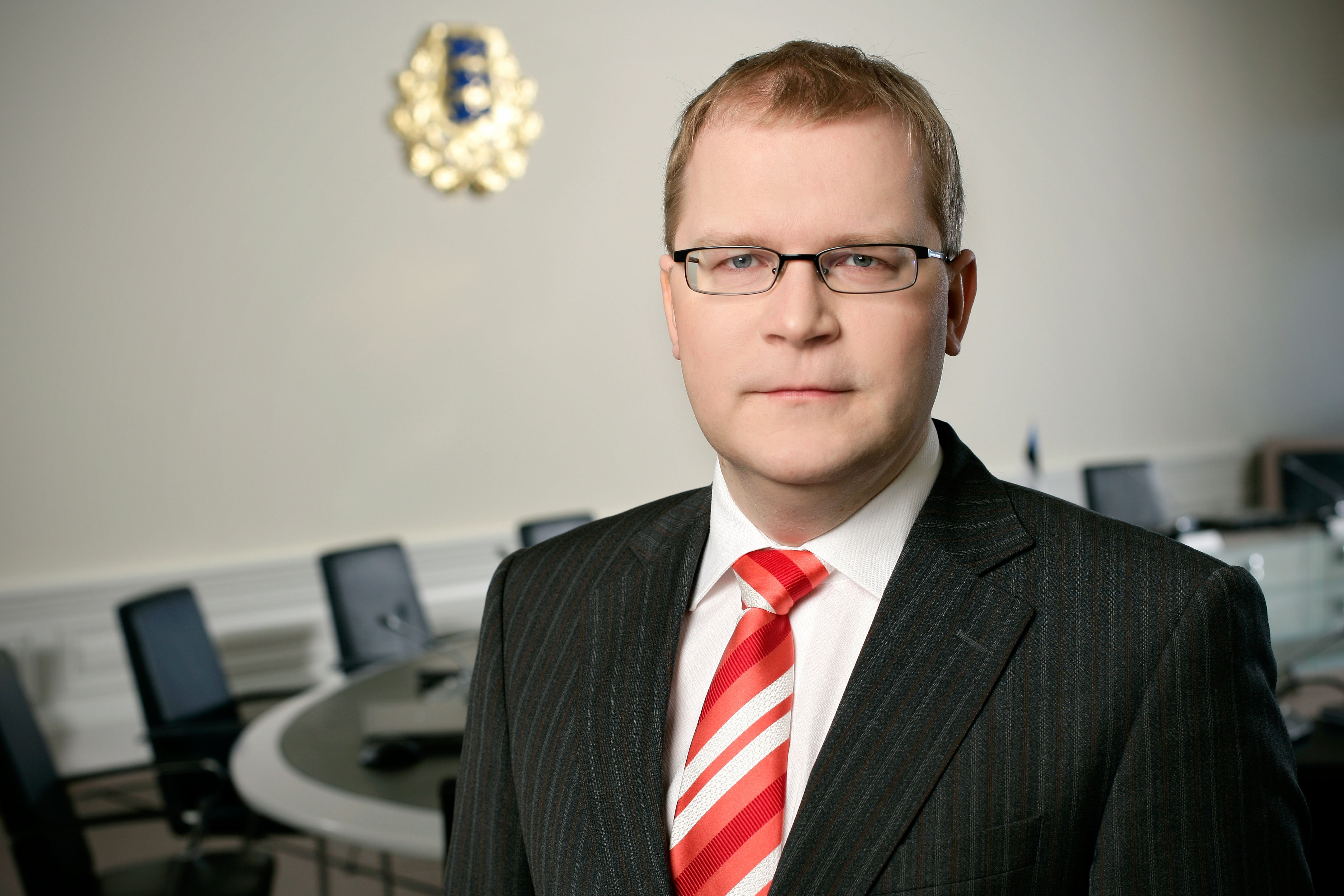 Urmas Paet